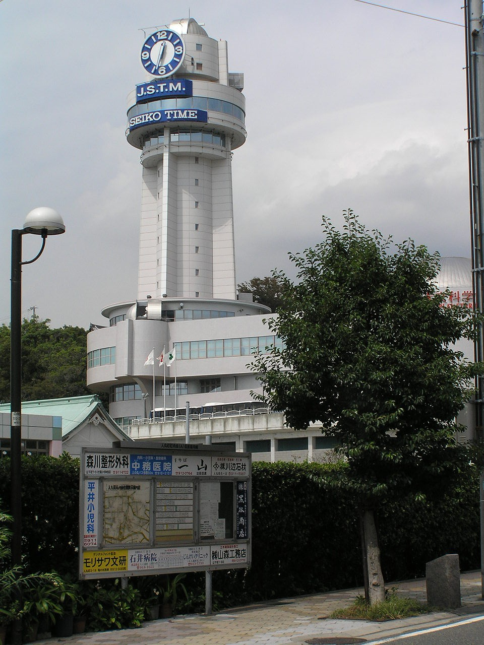 明石市立天文科学館